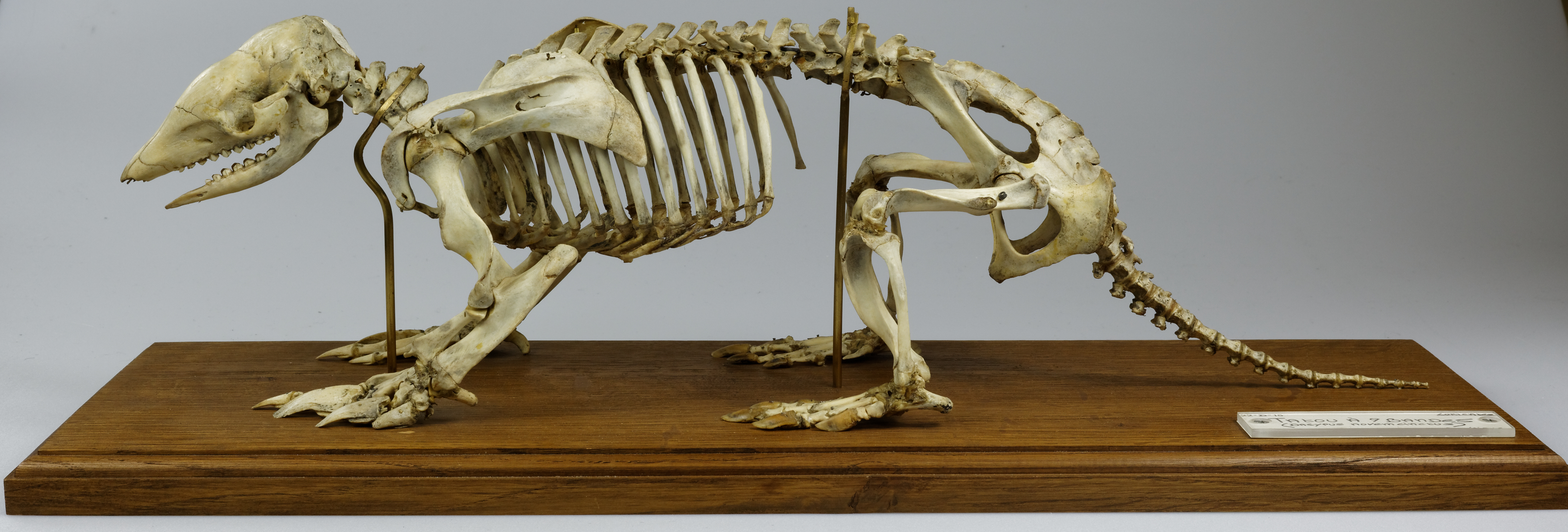 Un tatou à neuf bandes - Dasypus novemcinctus - de la collection de l'Université Pierre-et-Marie-Curie à Paris.